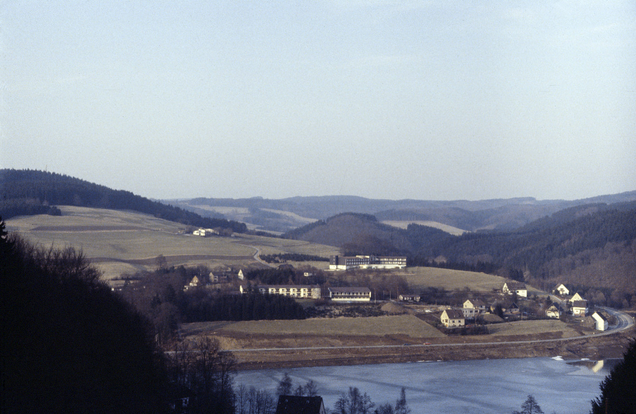 Deitenbach (aus Richtung Bruch); Mitte: Haus Aggertal (Pflegeheim)